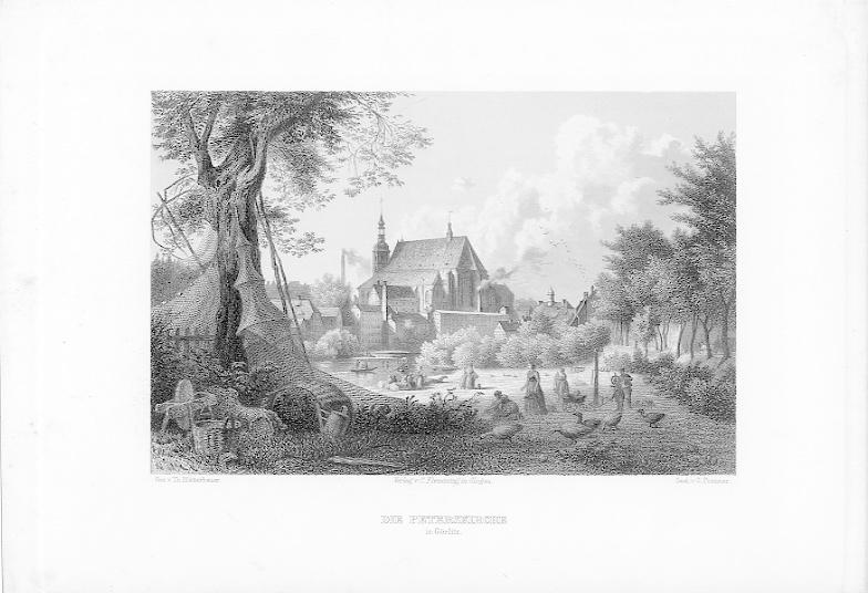 Die Peterskirche in Görlitz. Gez. v. Th. Blätterbauer. Verlag v. C. Flemming in Glogau. Gest. G. Pommer., 104x159 mm.